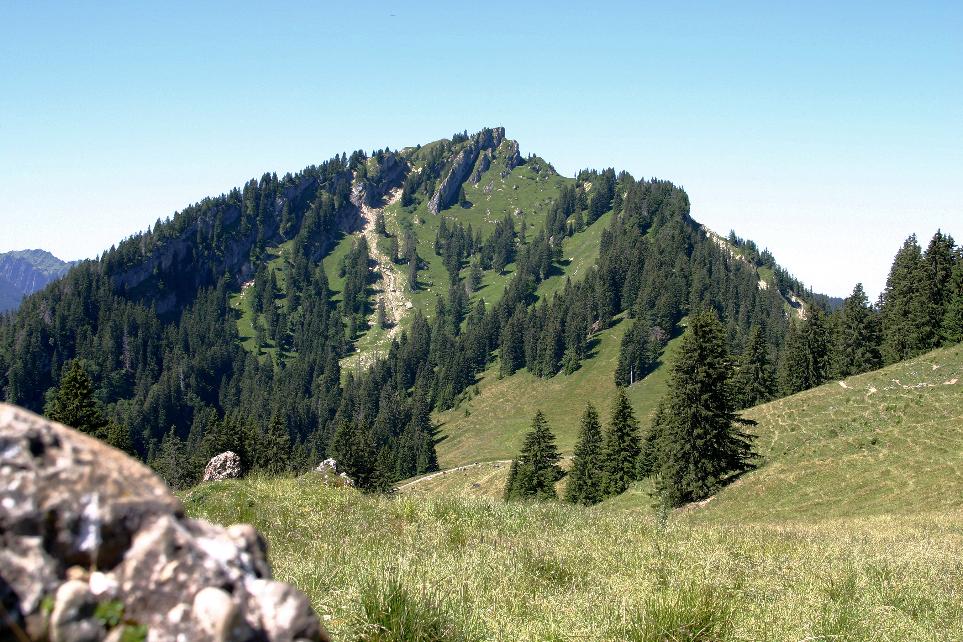 Steineberg (Allgäu) (1660 m, Nagelfluhkette) vom Bärenköpfle (1463 m) aus gesehen